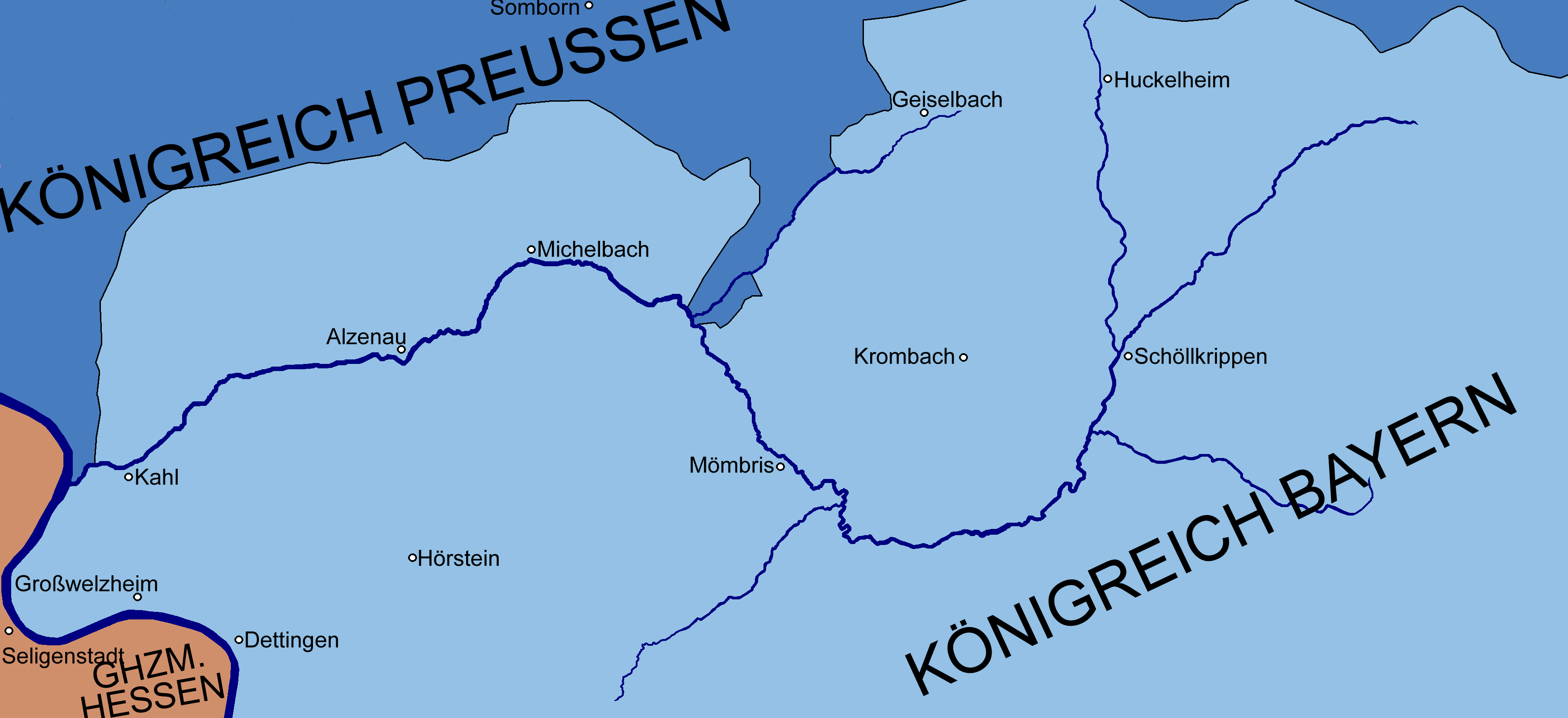 Die politische Zugehörigkeit des Kahlgrundes um 1880. Der Grenzverlauf der historischen Territorien kann stark abweichend dargestellt sein. Die Zugehörigkeit einiger Dörfer konnte nicht exakt nachgewiesen werden. Die Ortsnamen wurden in ihrer heutigen Namensform eingetragen.